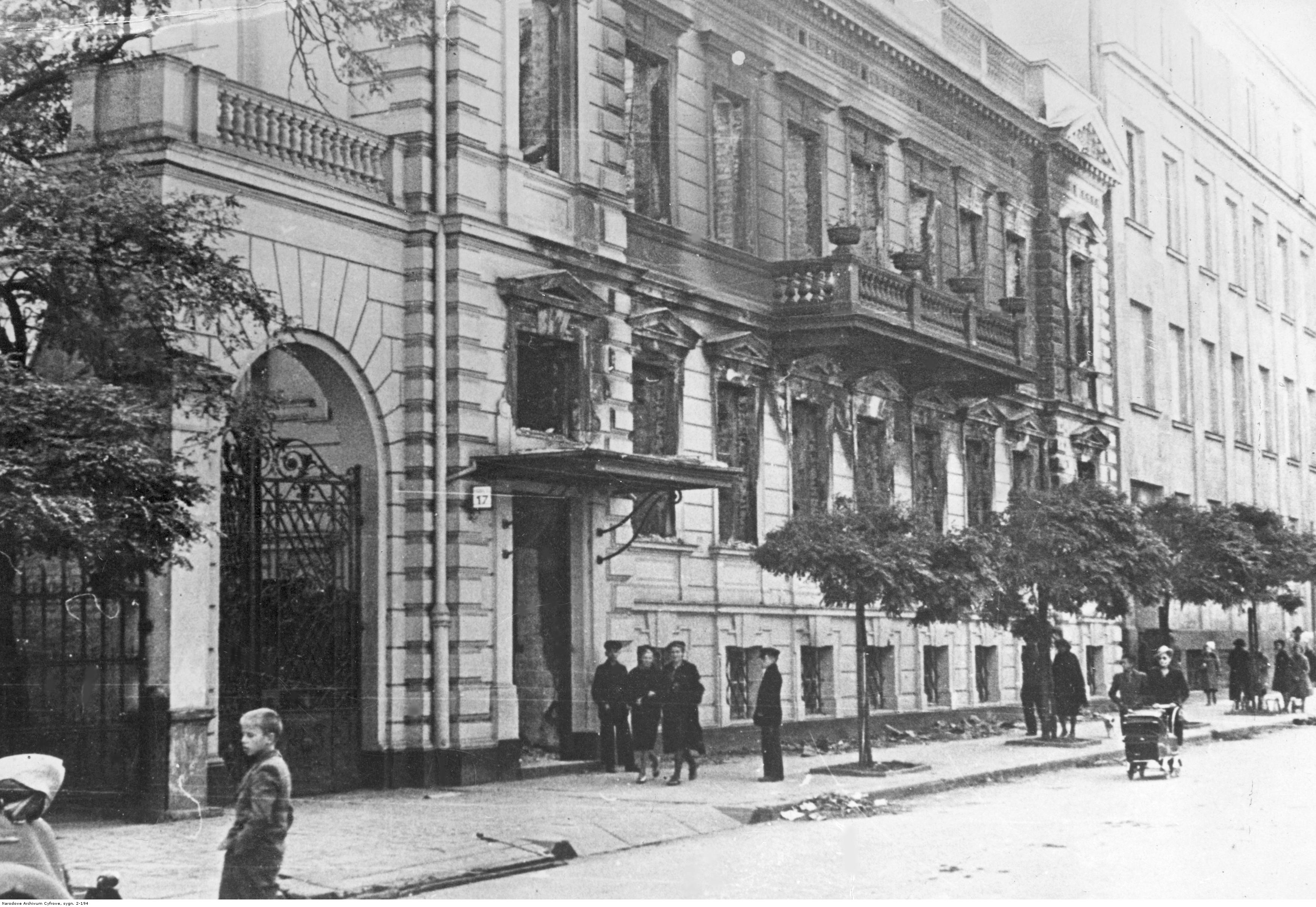 Zbombardowany przez Luftwaffe pałacyk Klary Dillenius - siedziba ambasady niemieckiej - przy ul. Piusa XI 17 (ob. ul. Piękna).